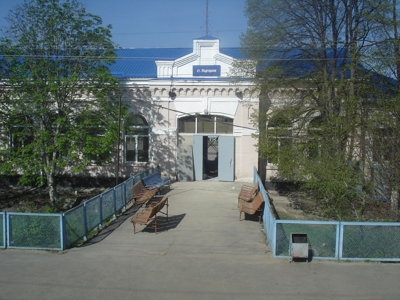 Железнодорожная станция Подгорное